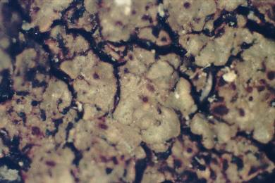 Acarospora fuscata